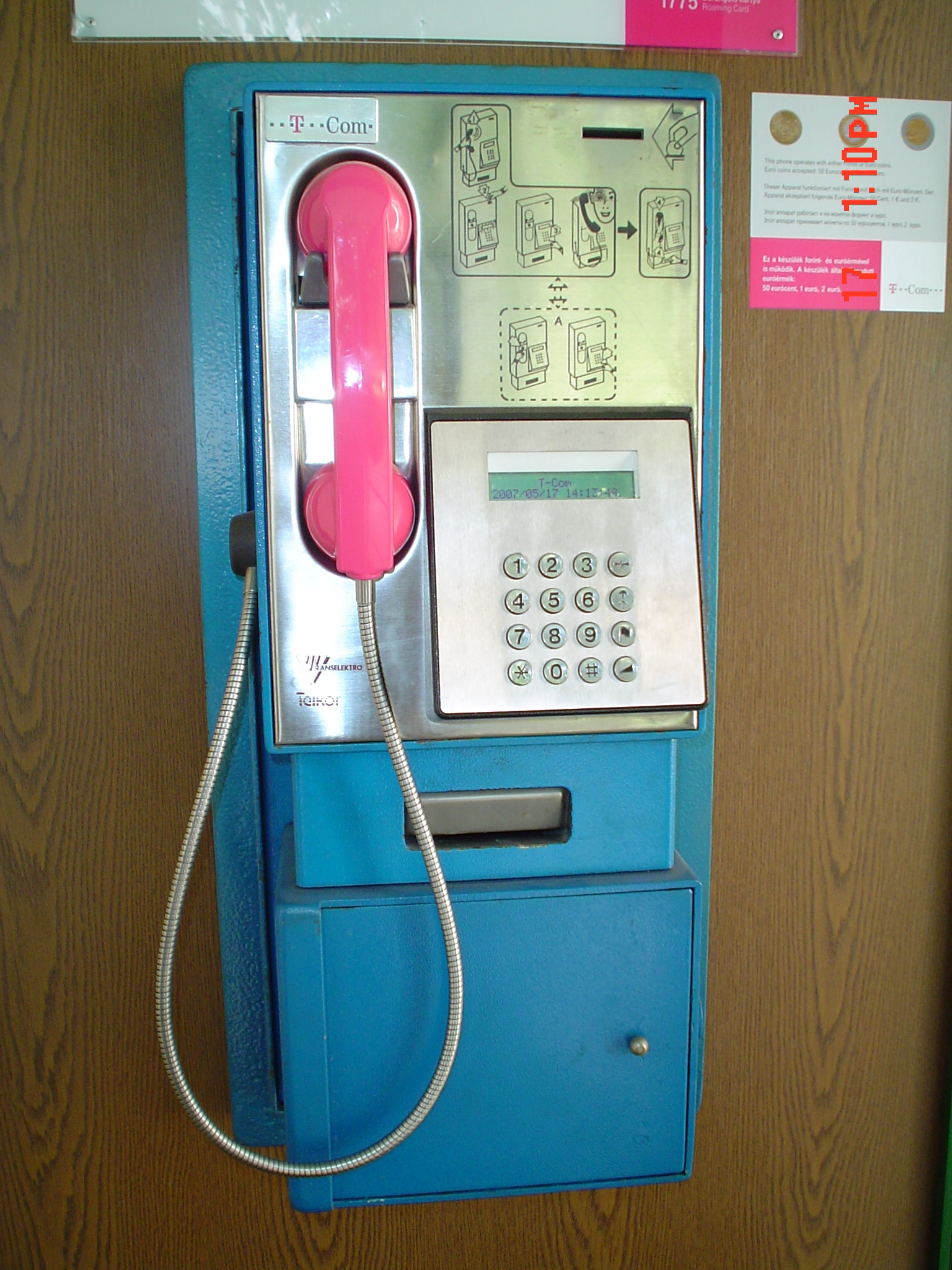 Monera publika butonara telefono